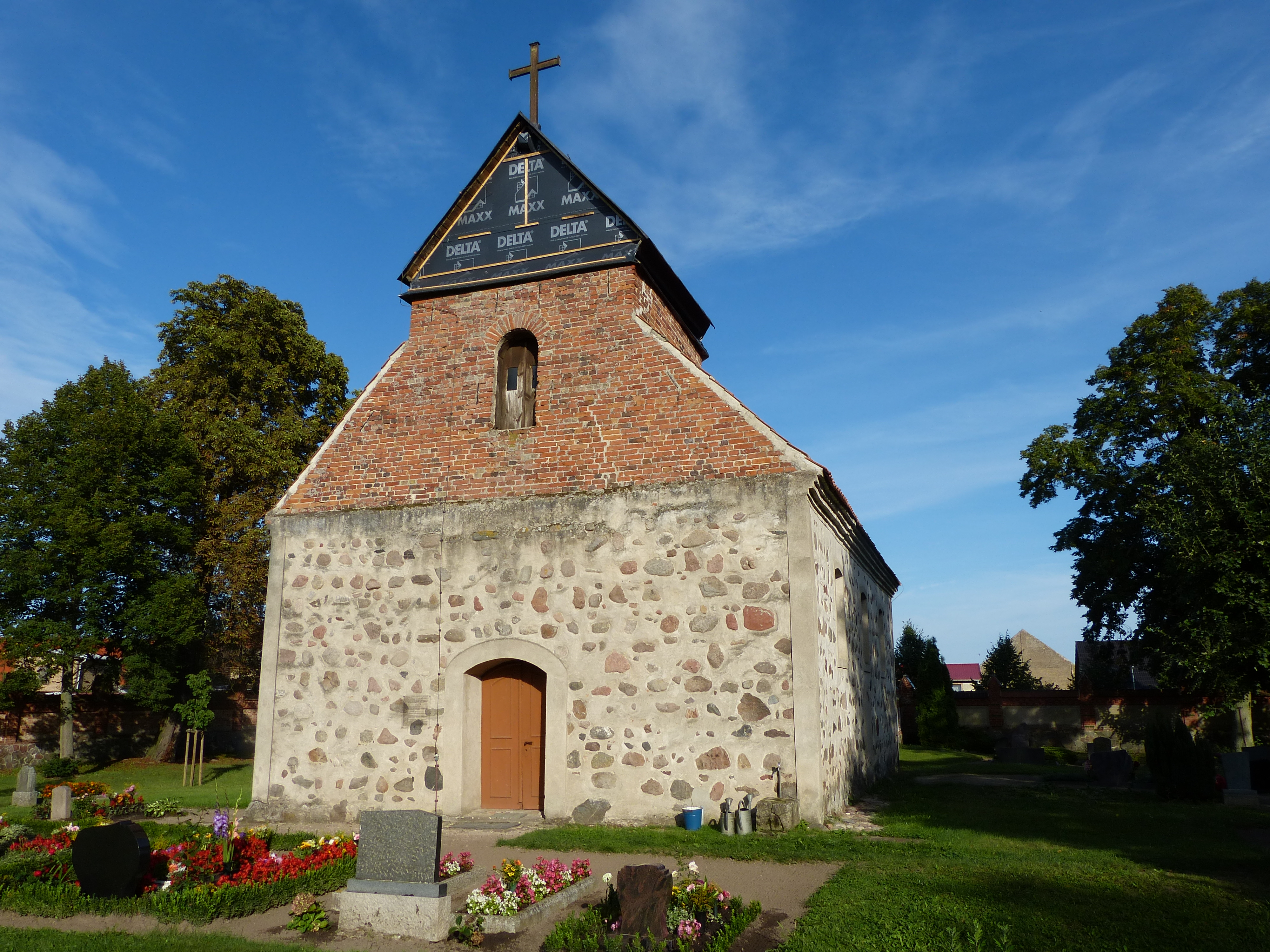 Kirche in Löwitz, Westgiebel, 2012 Bauarbeiten am Kirchturm